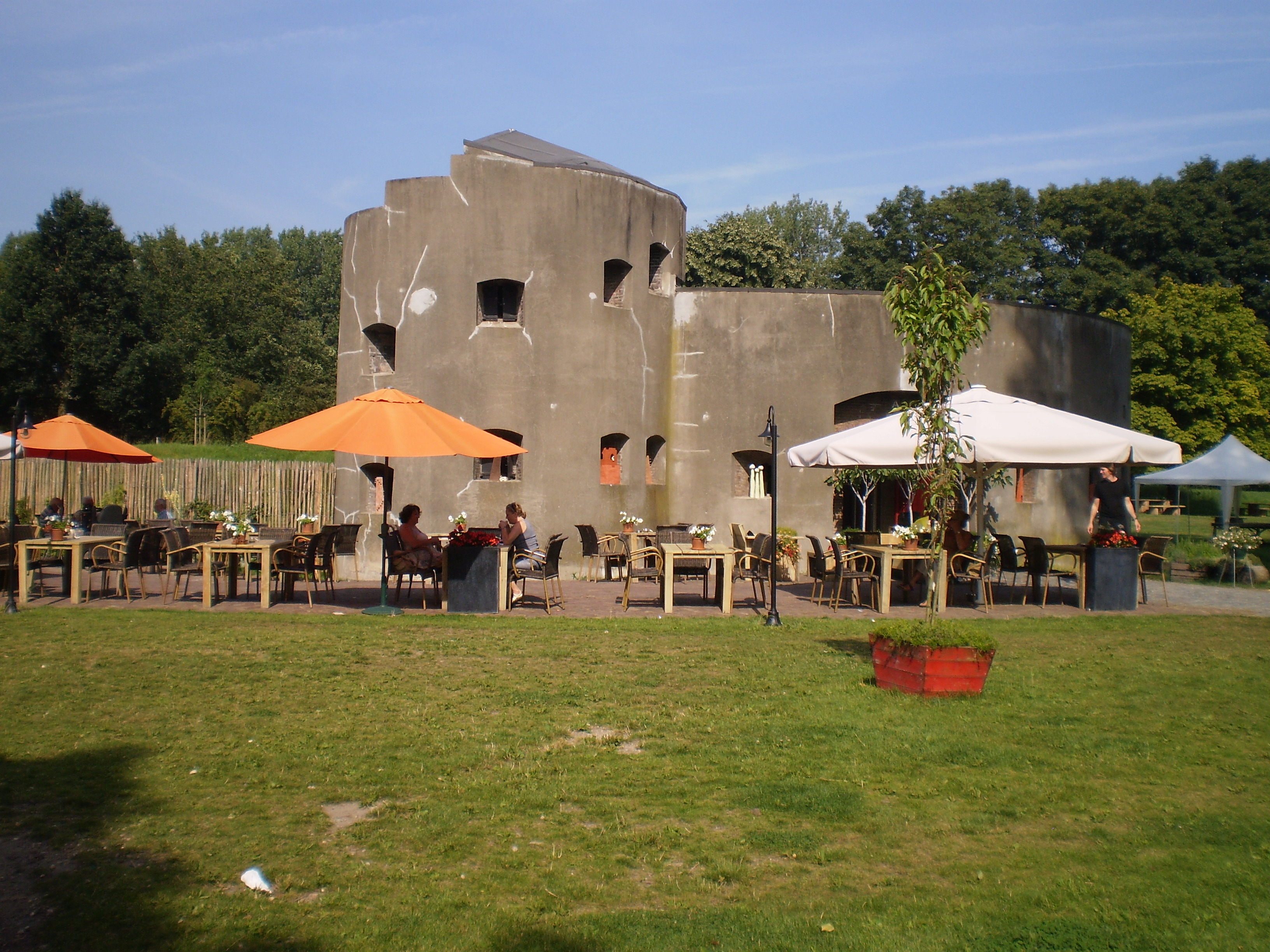 Fort aan de Klop